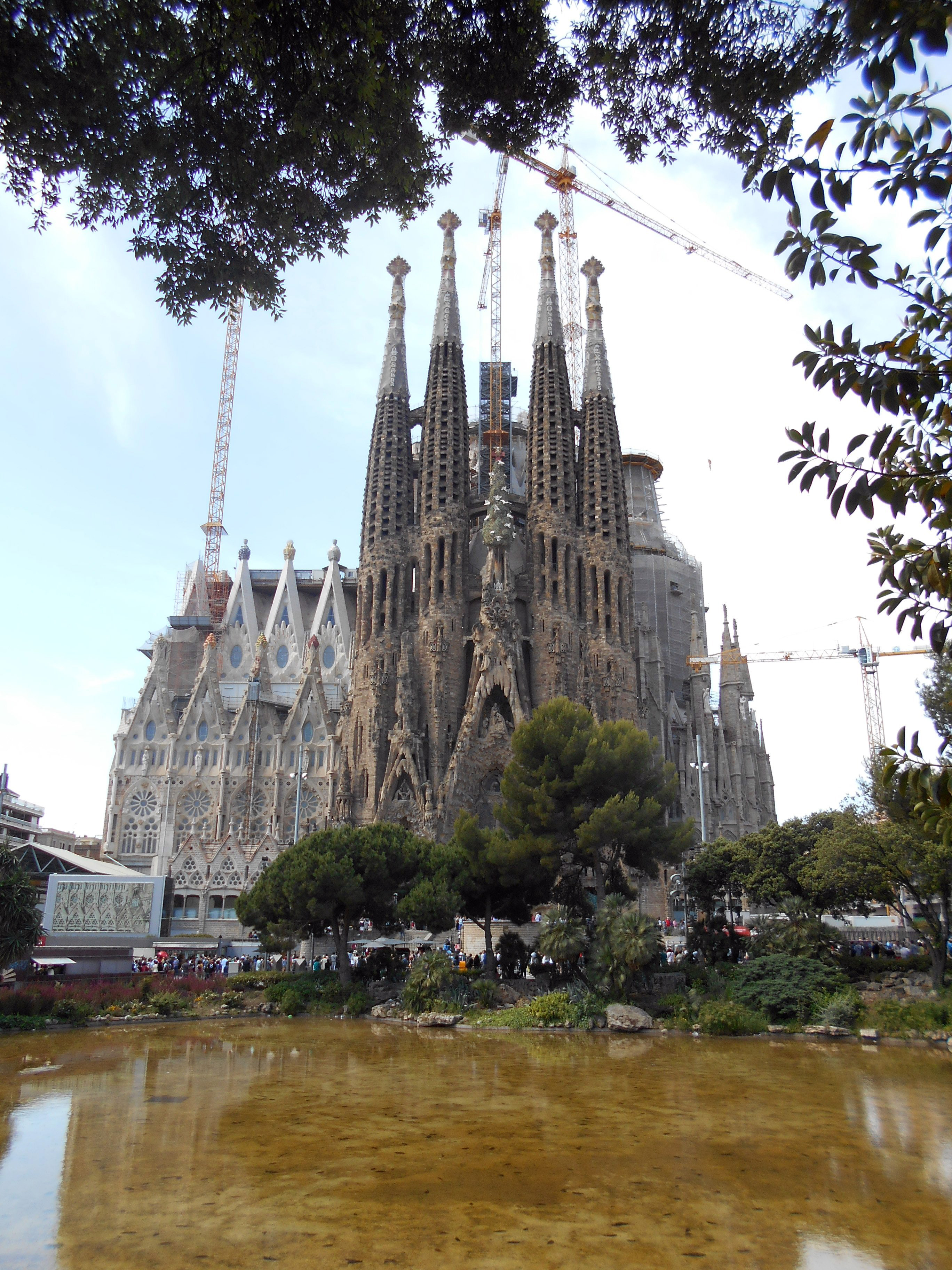 Sagrada Familia.